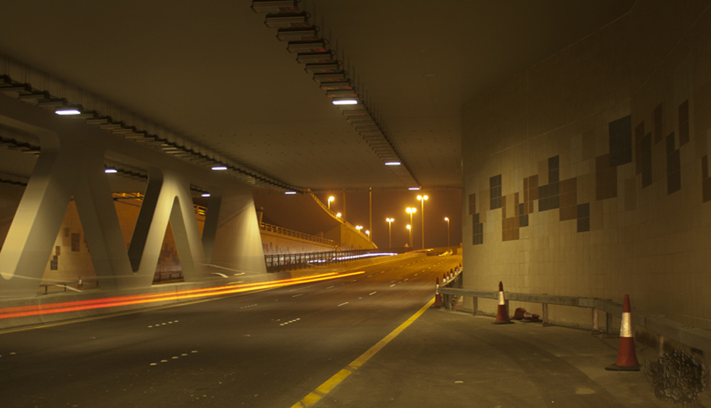 The underpass under Um al Hasam junction, in 2010.